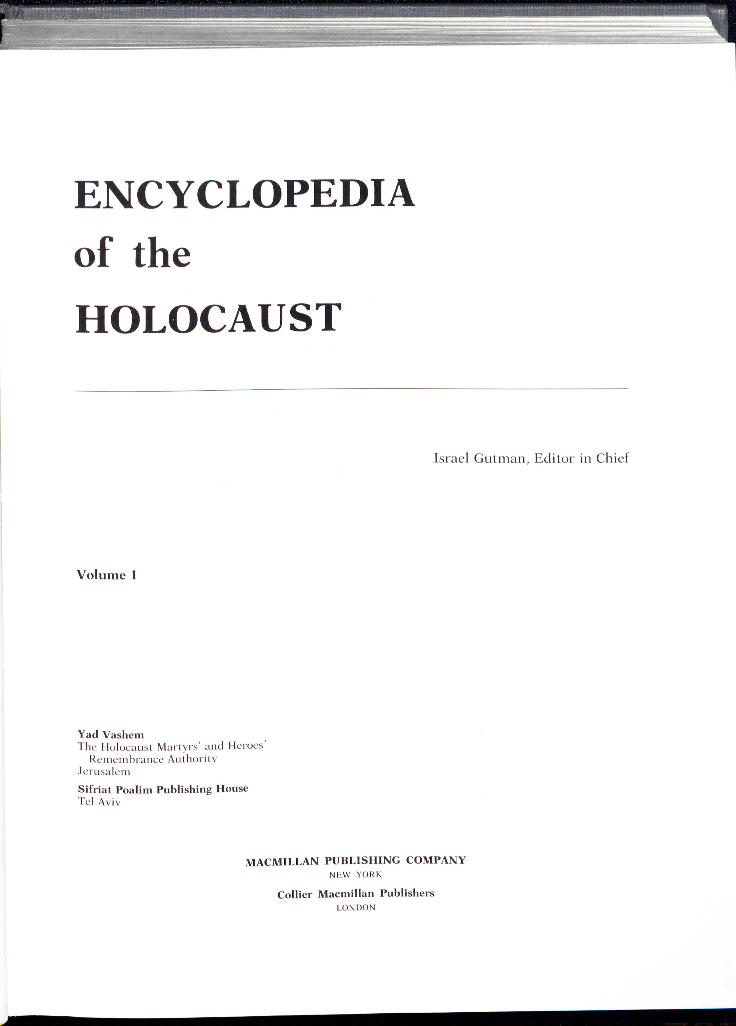 Encyclopedia of the Holocaust vol 1 title